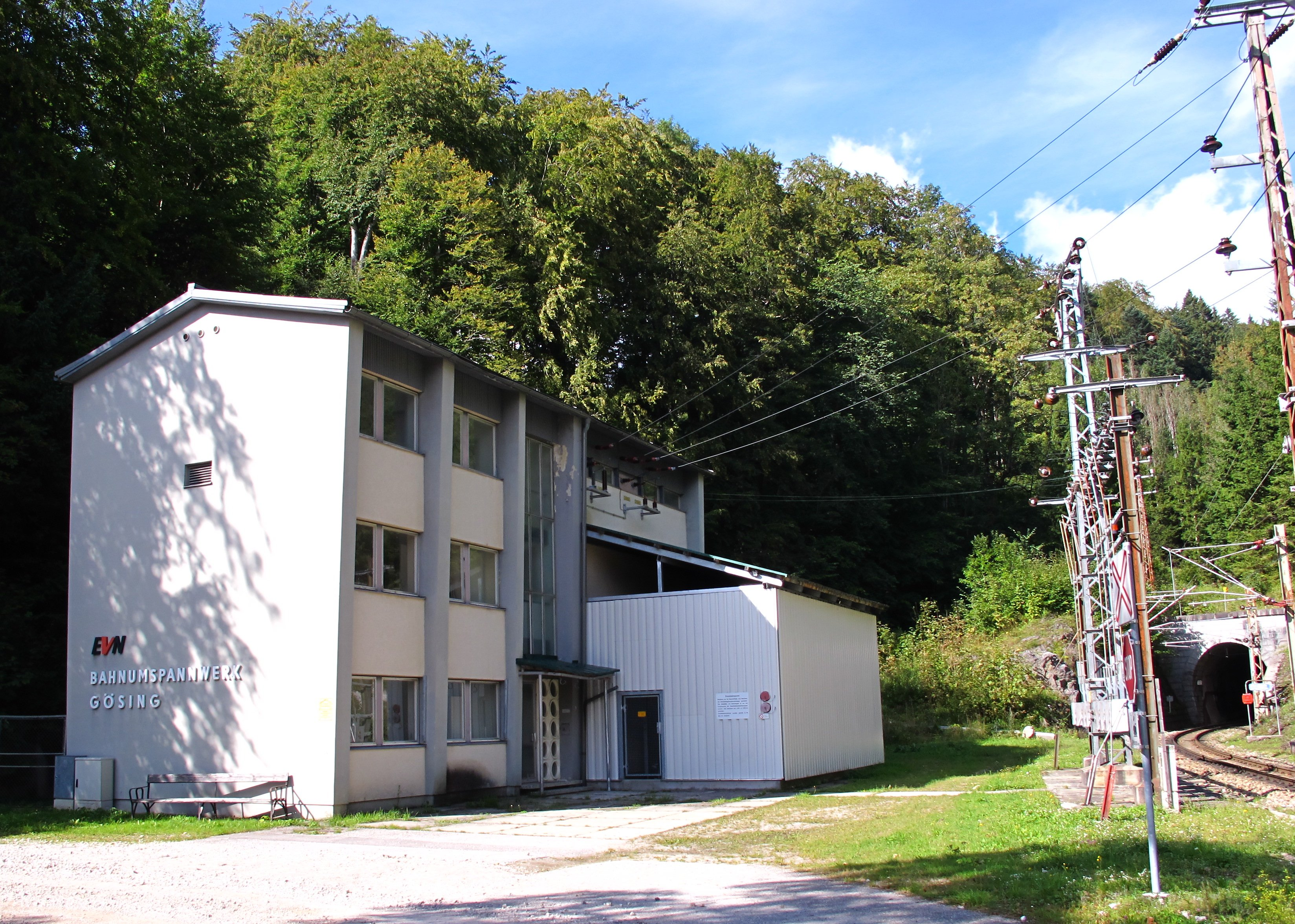 Bahnumspannwerk GösingUmspannwerk für die Mariazellerbahn welches die Spannung von 27 kV, von den Kraftwerken Erlaufboden und Wienerbruck, auf die Fahrdrahtspannung von 7 kV transformiert.Rechts befindet sich das Südportal des Gösingtunnels